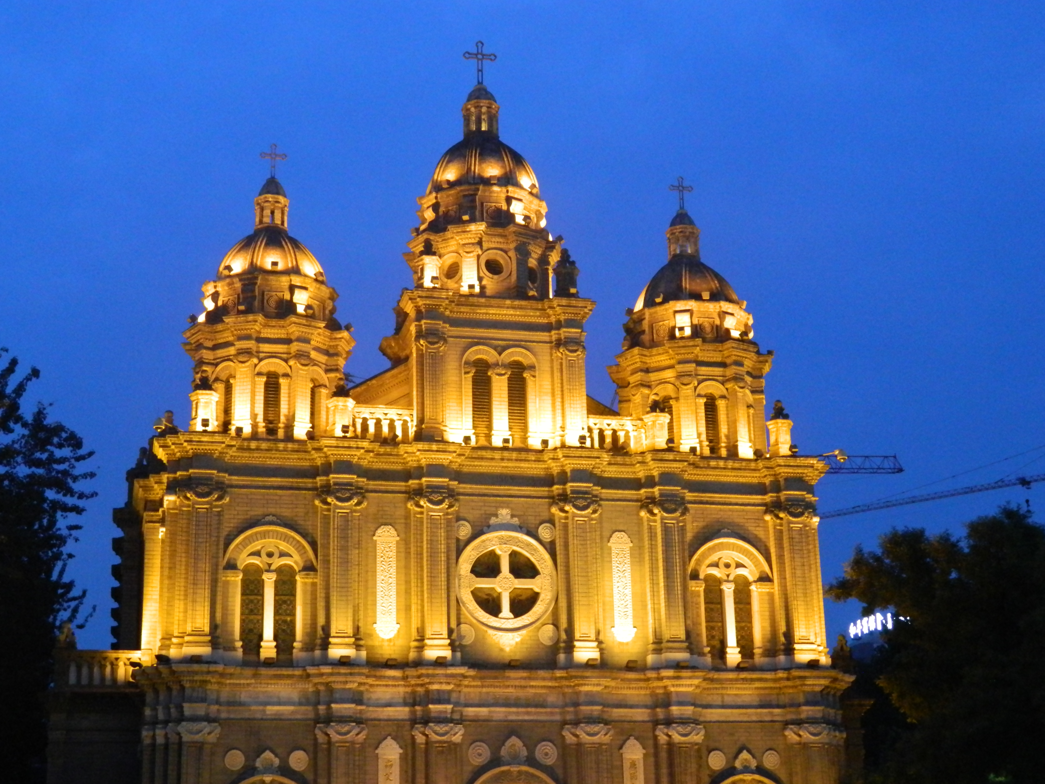 王府井天主堂夜景(开启装饰灯光后)